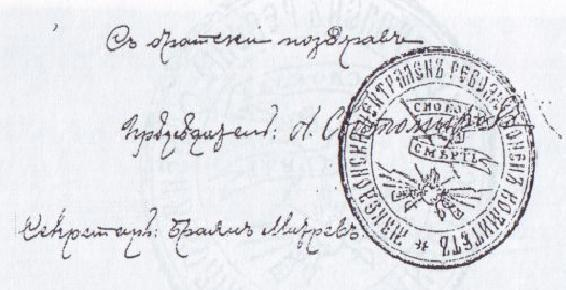 Печат на Централния комитет на ВМОРО.